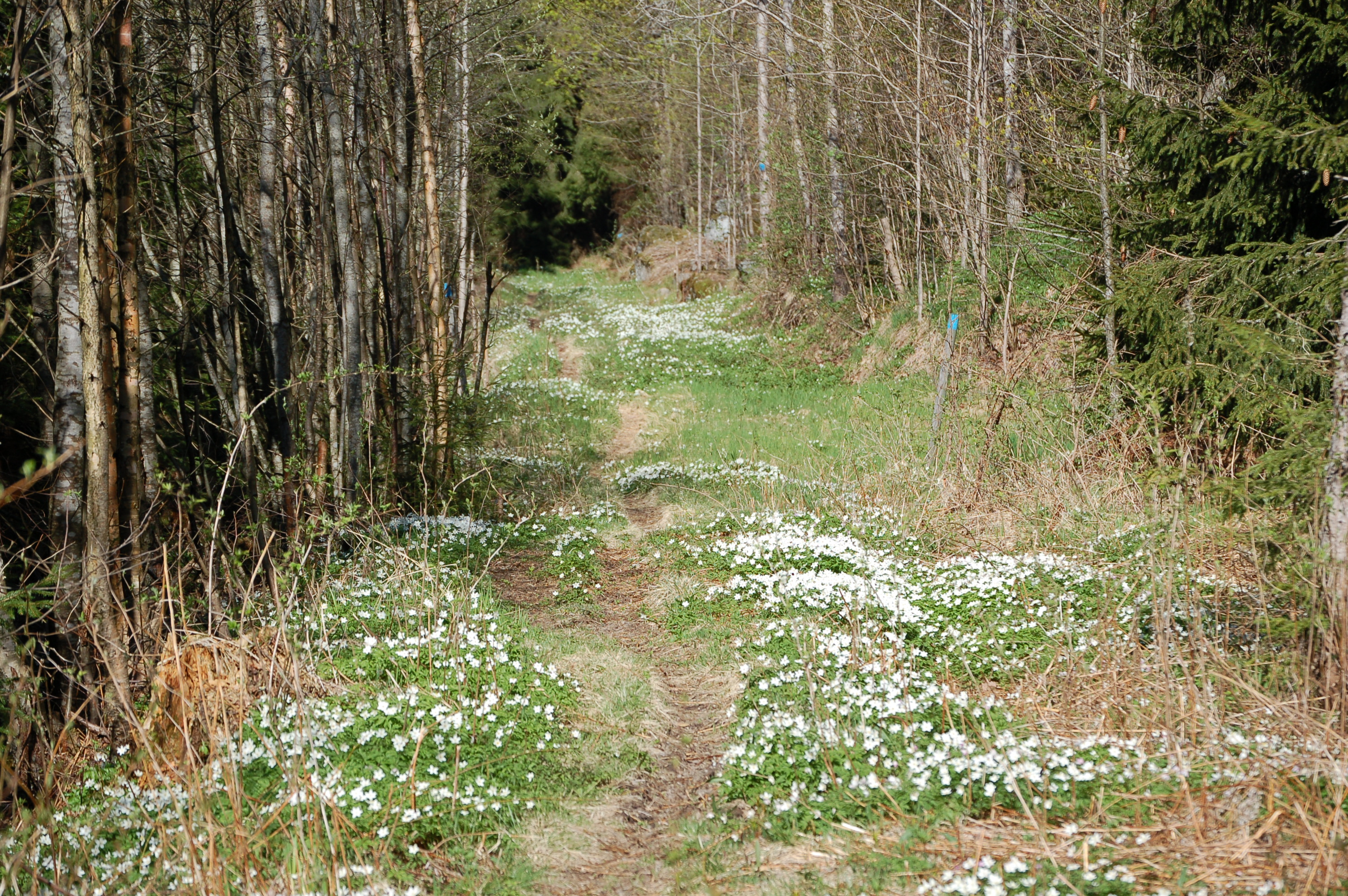 Hvitveis (Anemone nemorosa) ved tursti i Vestmarka ved Larvik